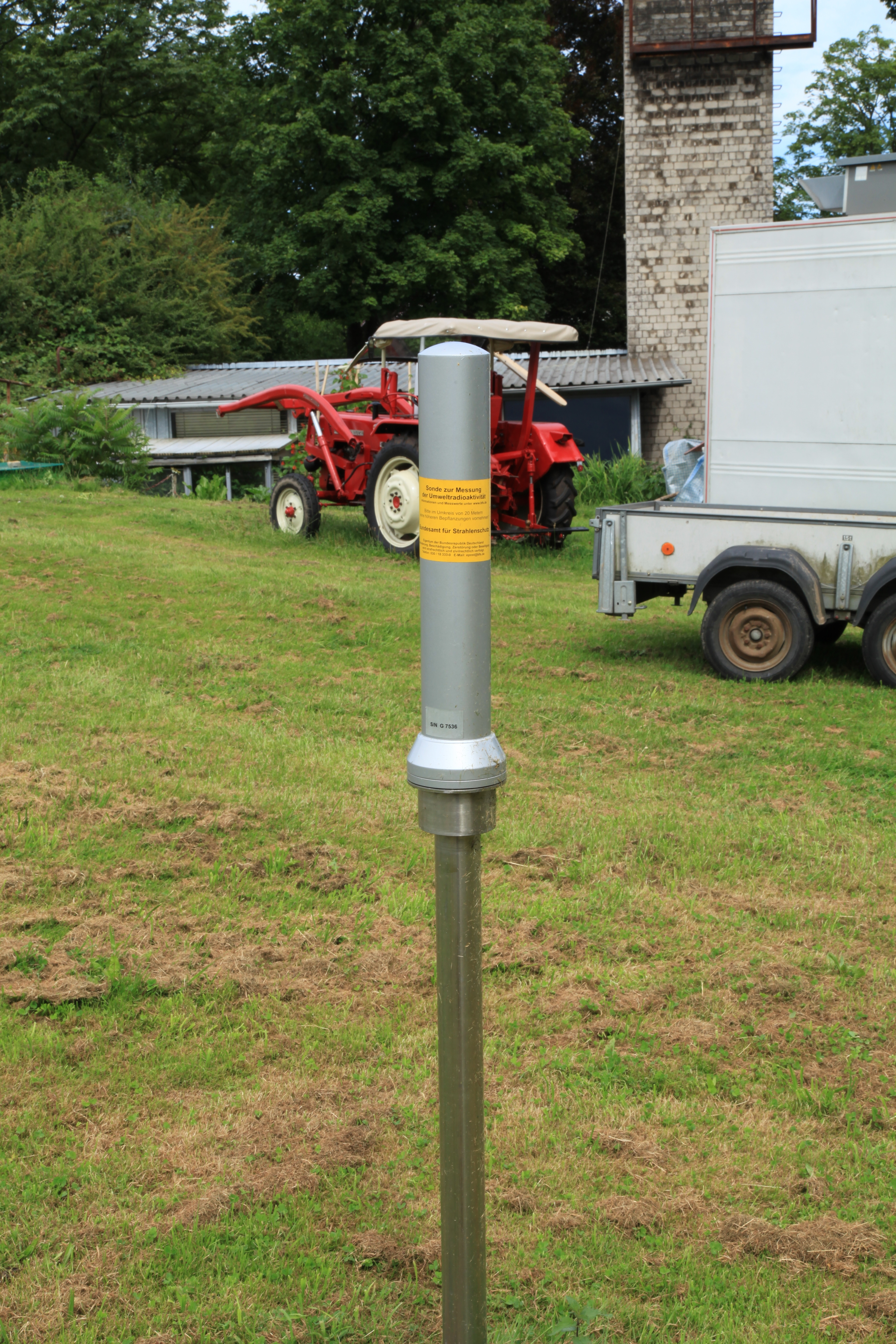 Sternwarte Bochum an der Blankensteiner Straße in Bochum TYP GS07